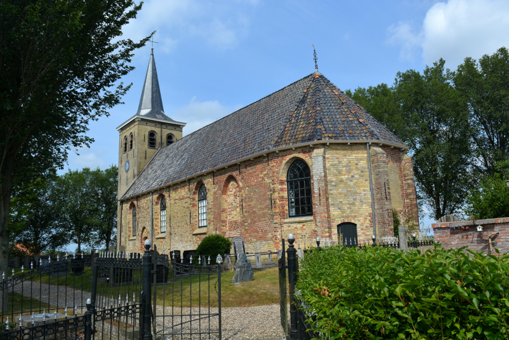 Bears, Marijetsjerke